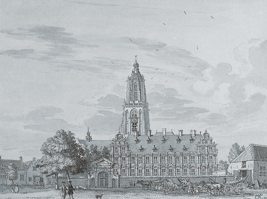 Palast des Friedrich V. von der Pfalz (Winterkönig) in Rhenen, erbaut 1630/31 durch Bartholoeus van Bassen